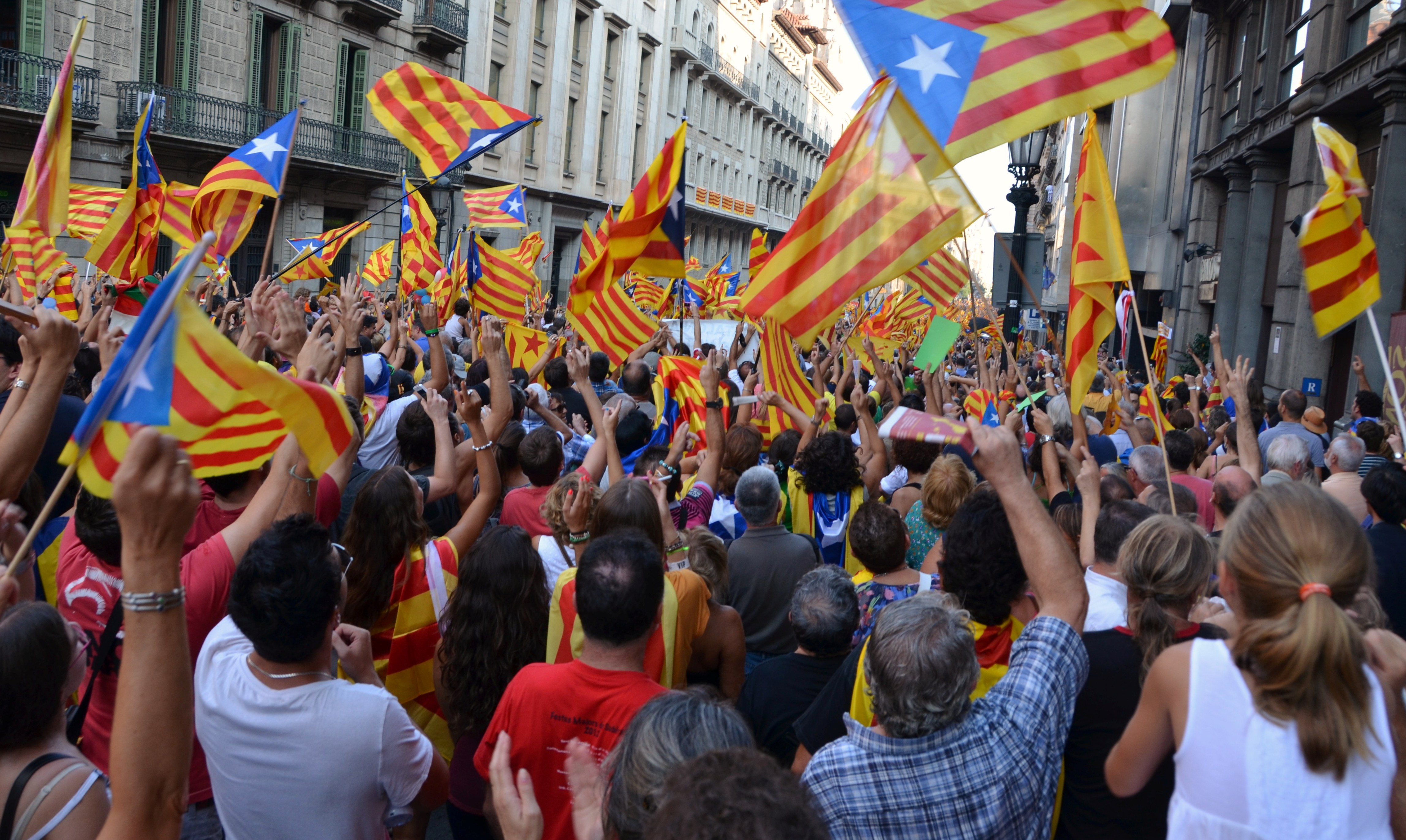 11 de setembre de 2012. Via Laietana